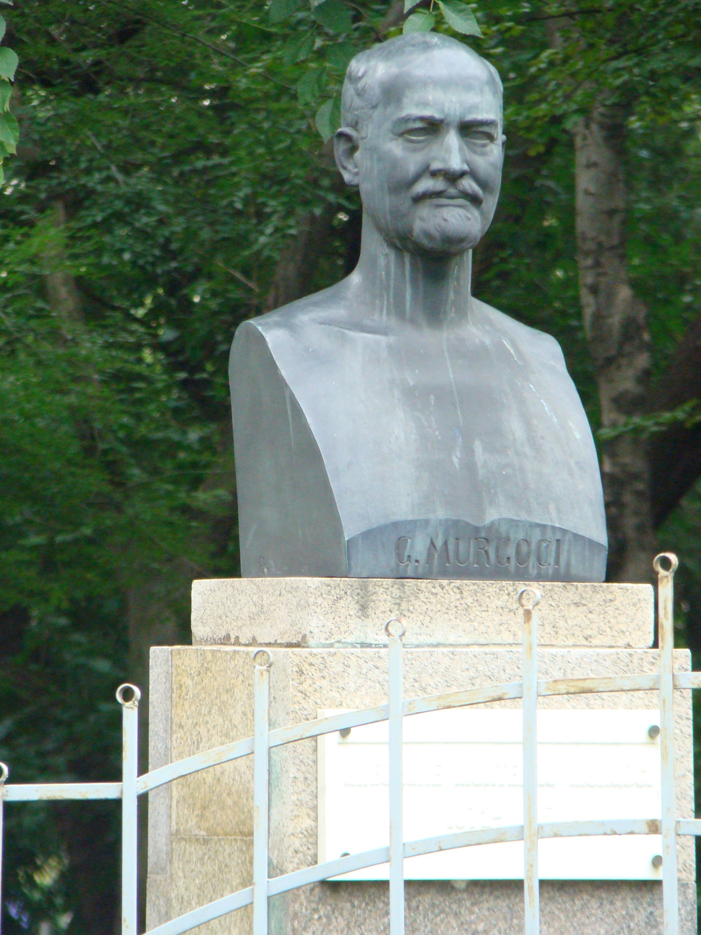 Bustul prof. Gh. Munteanu-Murgoci în curtea Institutului Geologic